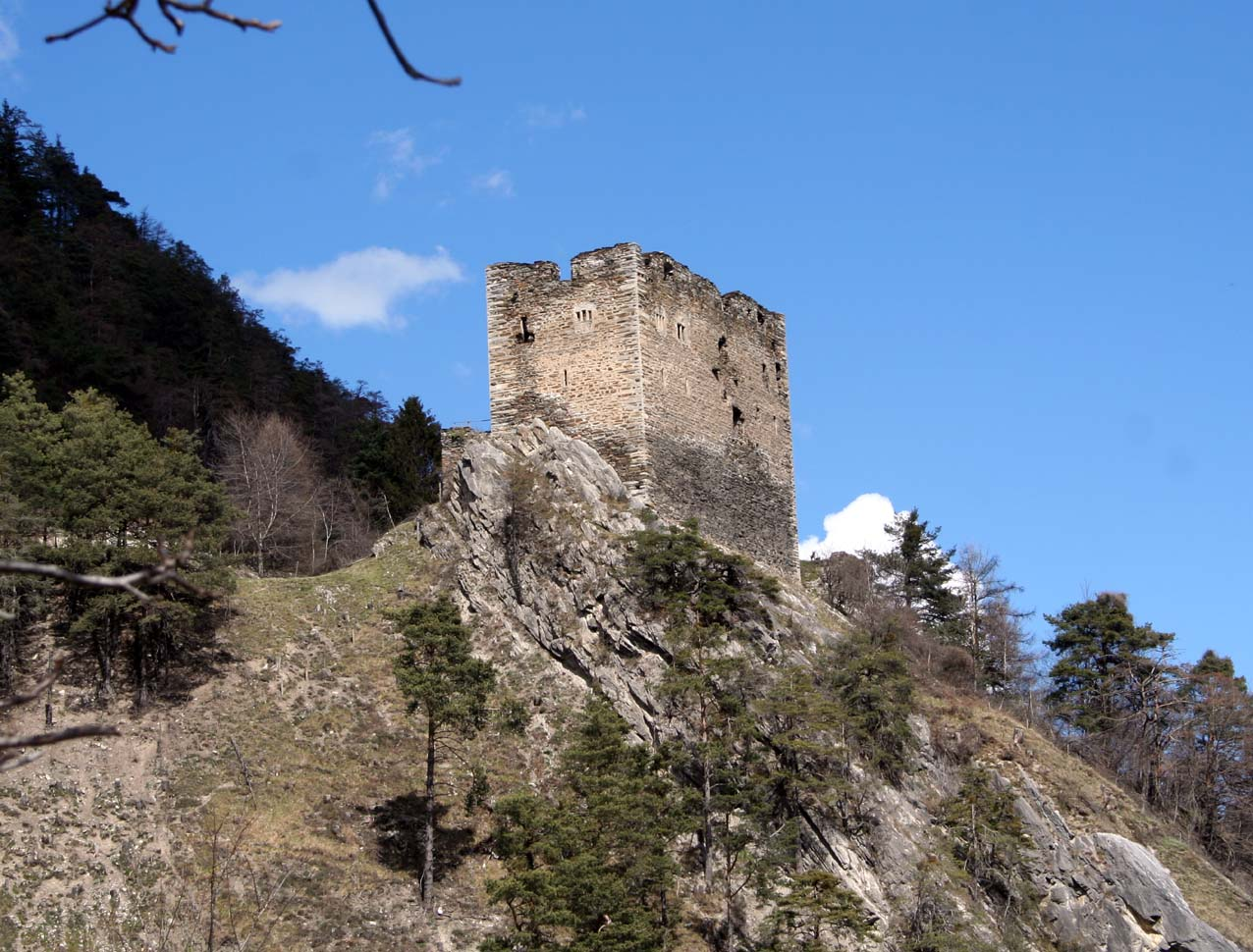 Neuburg